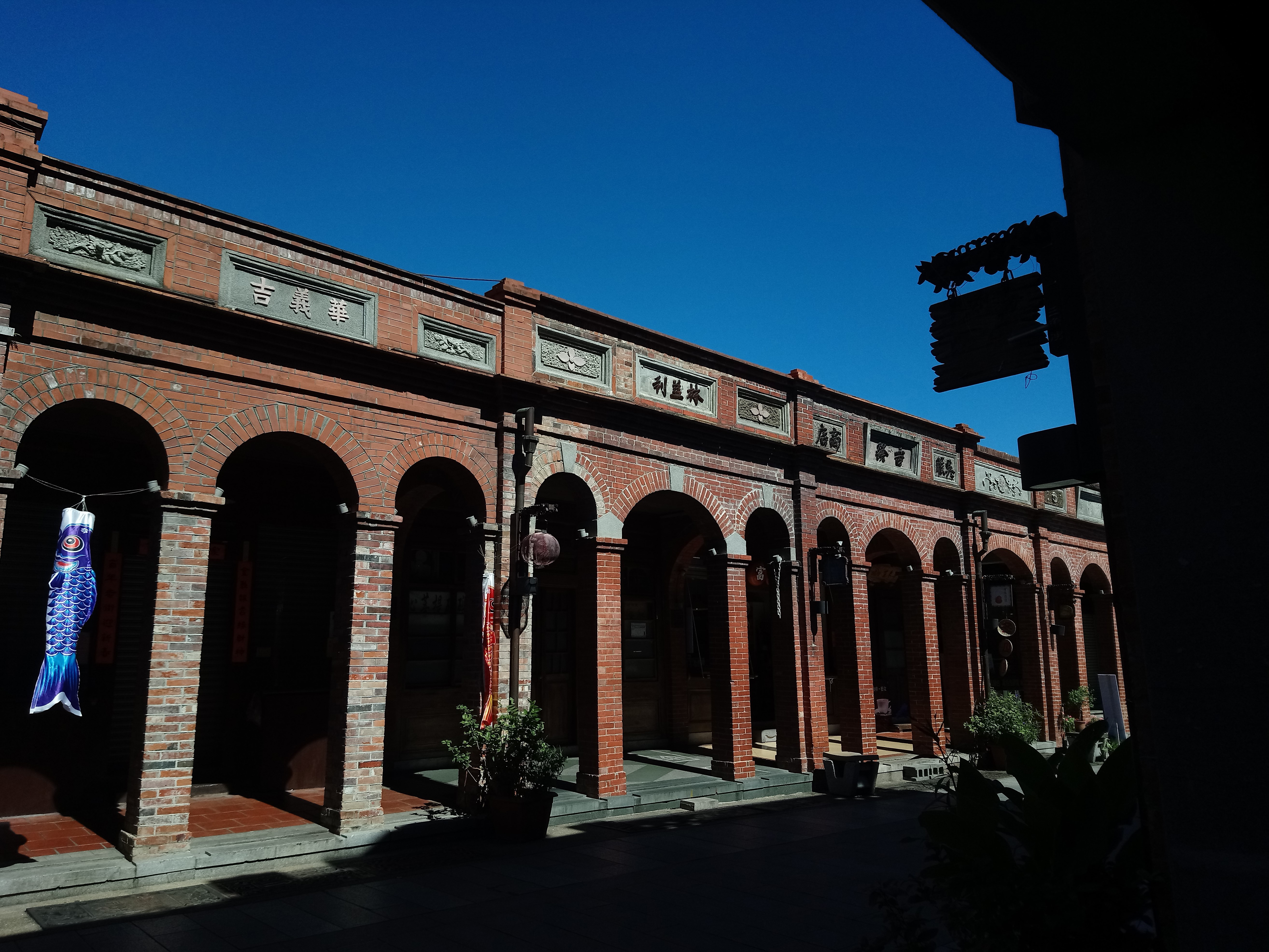 三峽老街(林吉發吳服商店、林義利與華益吉), 新北市三峽區三峽里